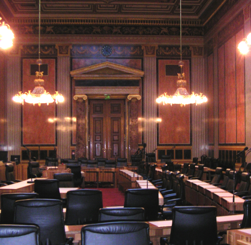 Sitzungssaal des Bundesrates (Länderkammer, Mitglieder von den Landtagen der Bundesländer entsandt) im österreichischen Parlament